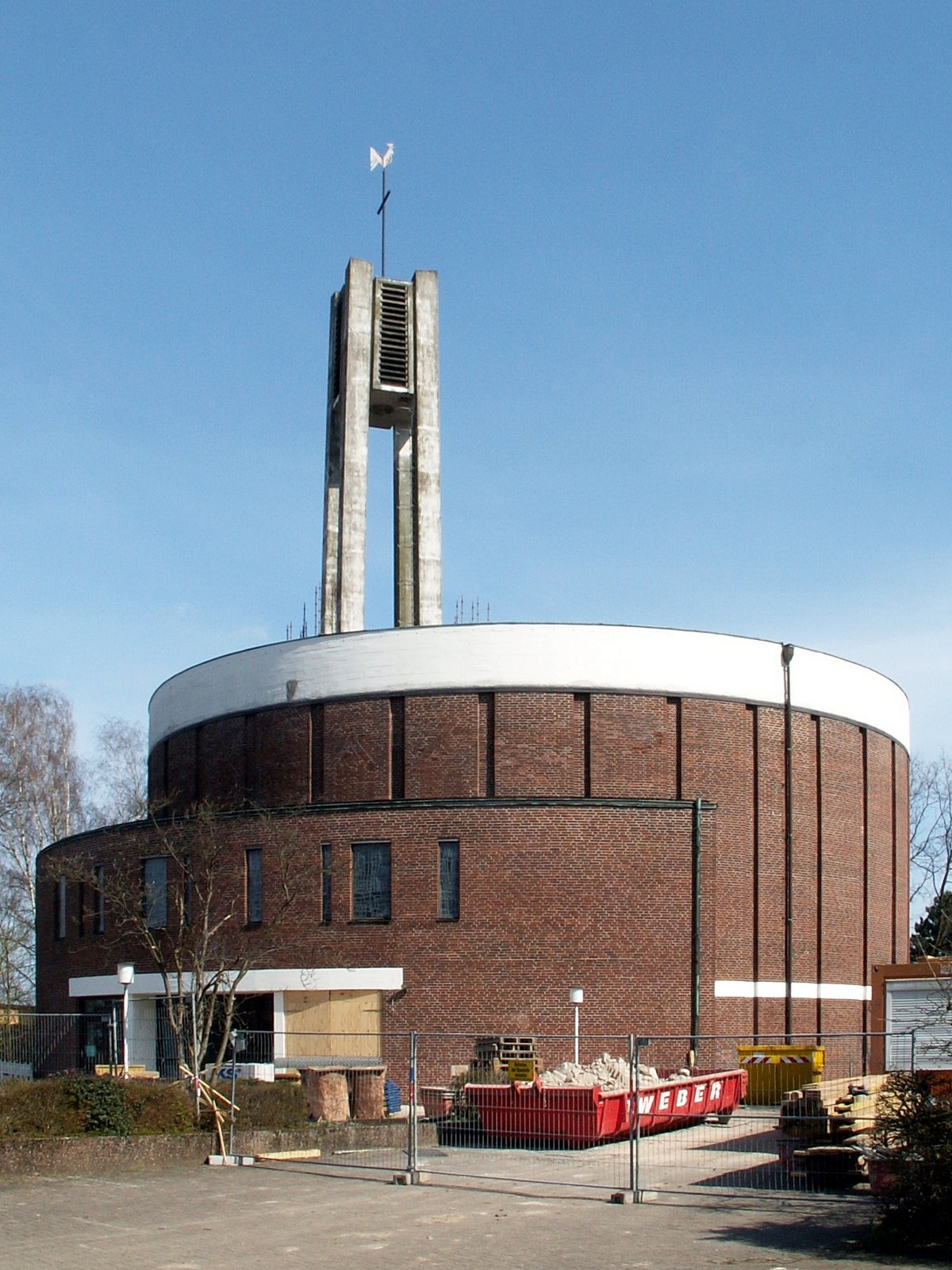 kath. Kirche Heilige Familie in Osnabrück, Stadtteil Schölerberg, Ansicht von Südwesten